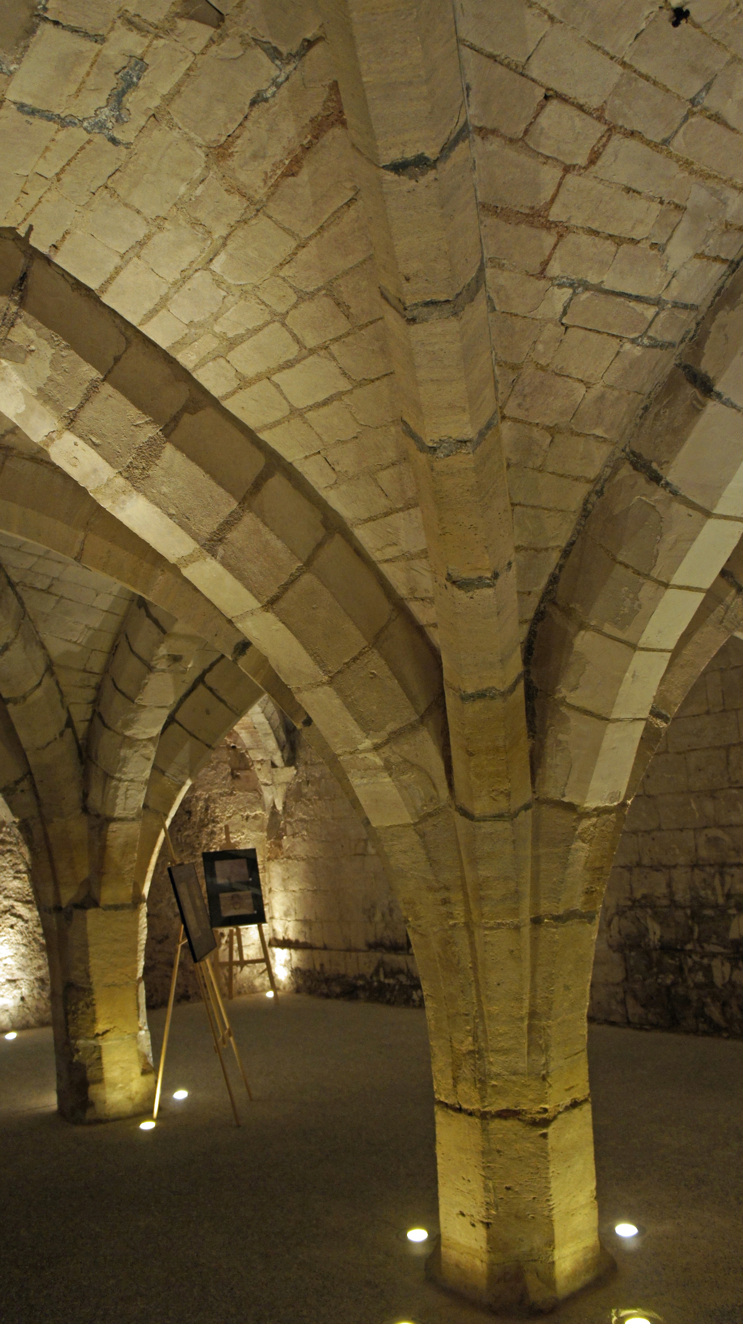 Caves médiévales des XIII et XVe siècle sous la galerie saint-Germain. .